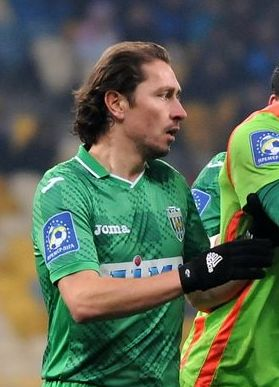 Ігор Худоб'як у грі "Динамо" - "Карпати"